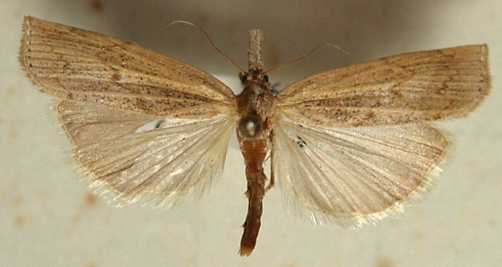 Pediasia aridella caradjella